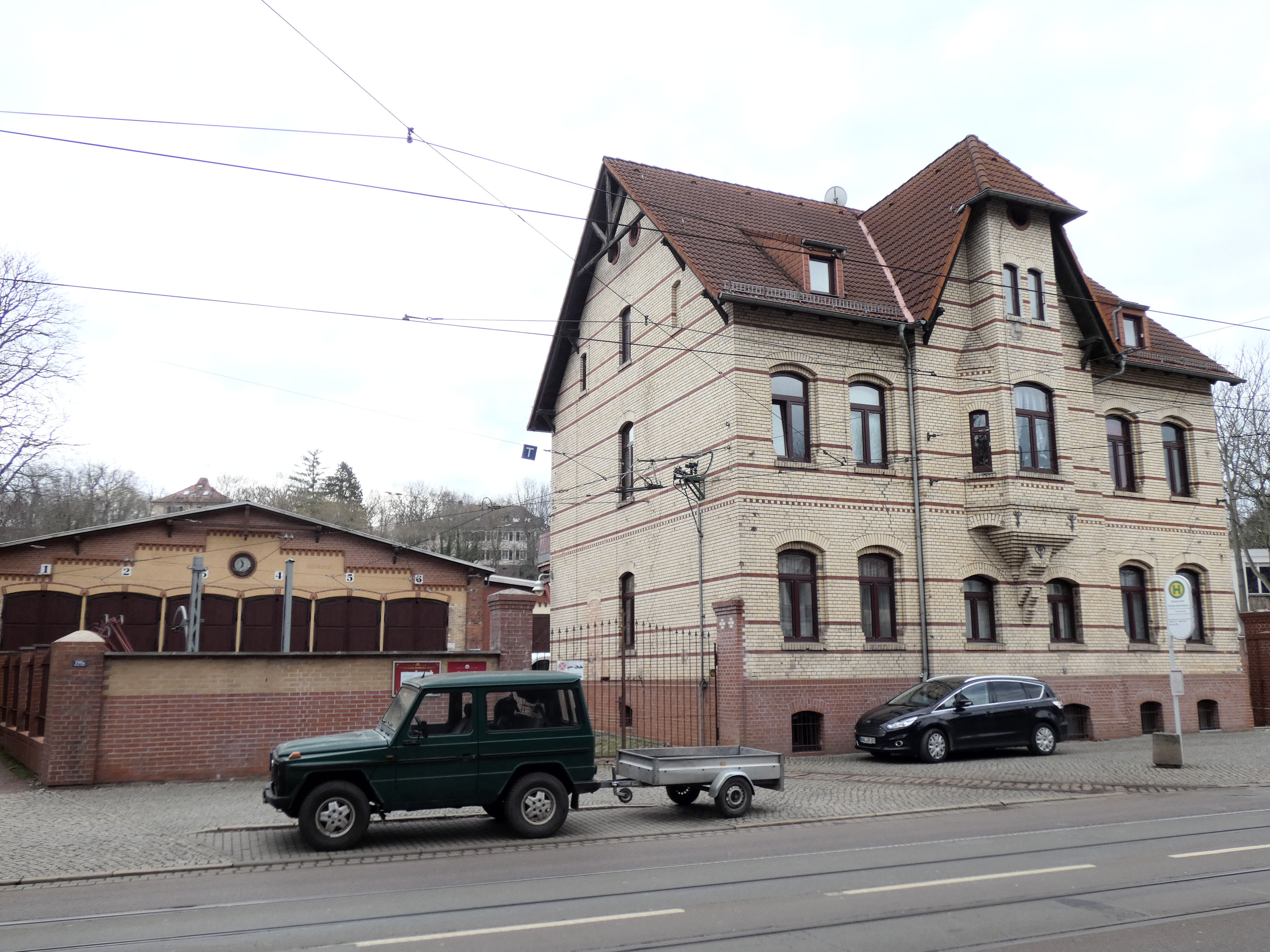 Historisches Straßenbahndepot mit Verwaltungsbau, Seebener Straße 191, Halle (Saale)